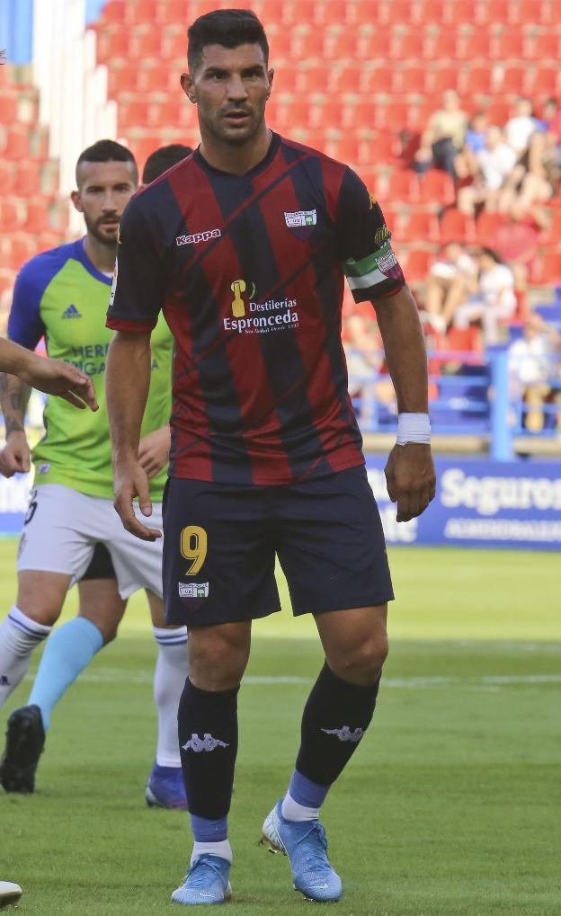 Imagen del futbolista Willy Ledesma jugando un partido con el Extremadura UD frente al Ponferradina en LaLiga SmartBank